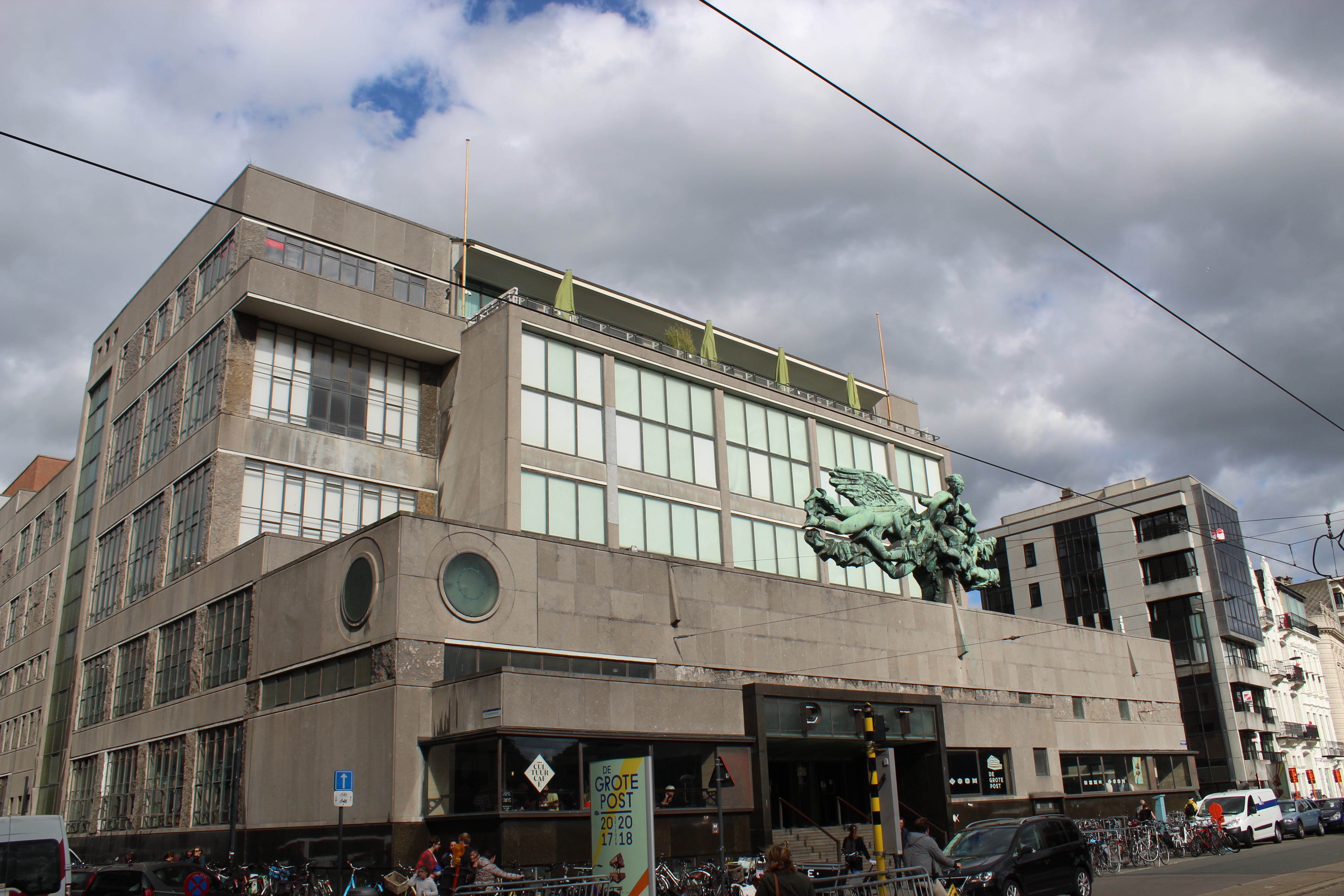 The former post office of Oostende (Belgium) in summer 2017 seen from the front.